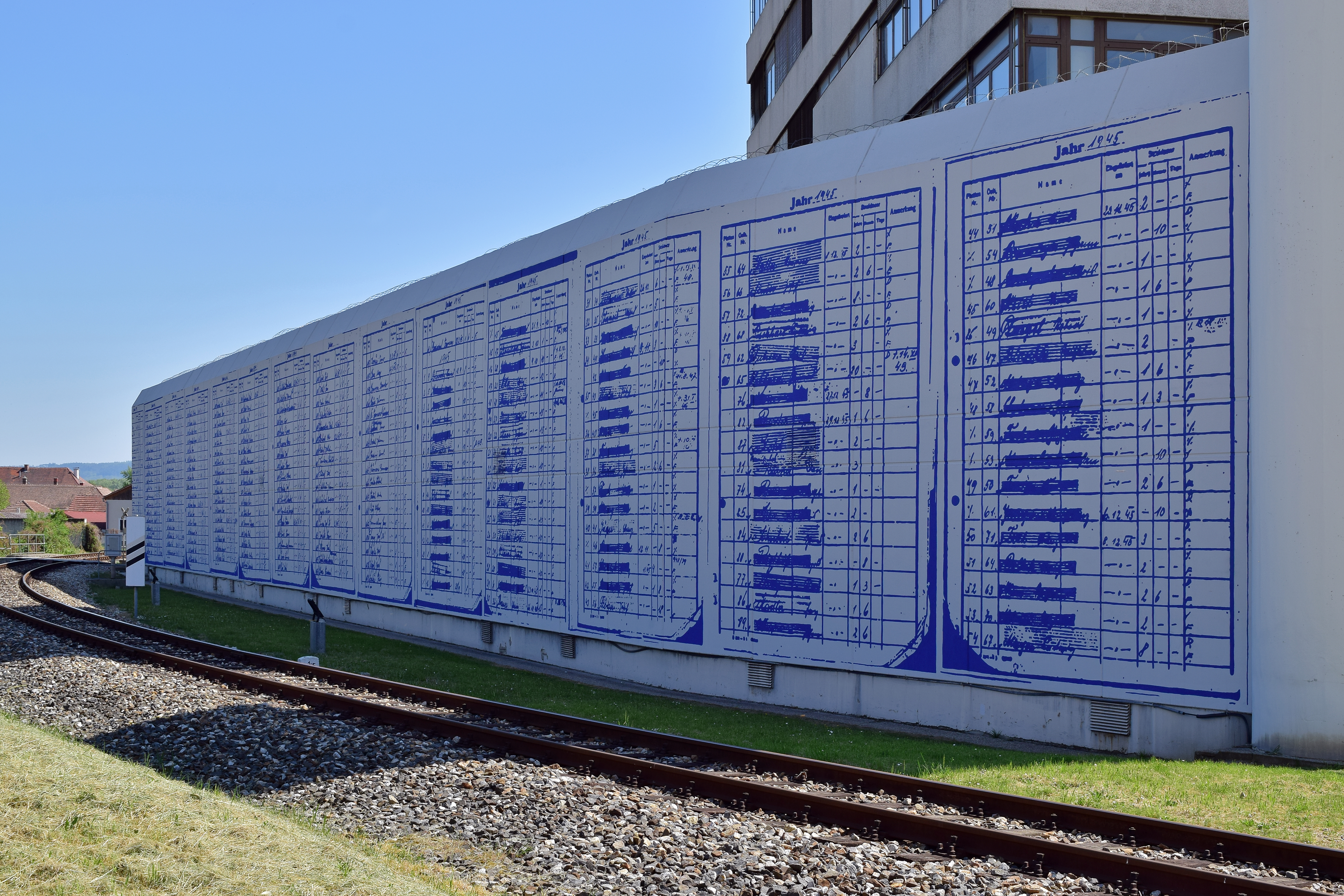 Zur Erinnerung an die Opfer des Massakers im Zuchthaus Stein wurden Fragmente des Strafgefangenenregisters der Jahre 1944 und 1945 auf die Gefängnismauer gemalt. Das Kunstwerk mit dem Titel "06.04.1945" wurde 2018 von Ramesch Daha gestaltet.